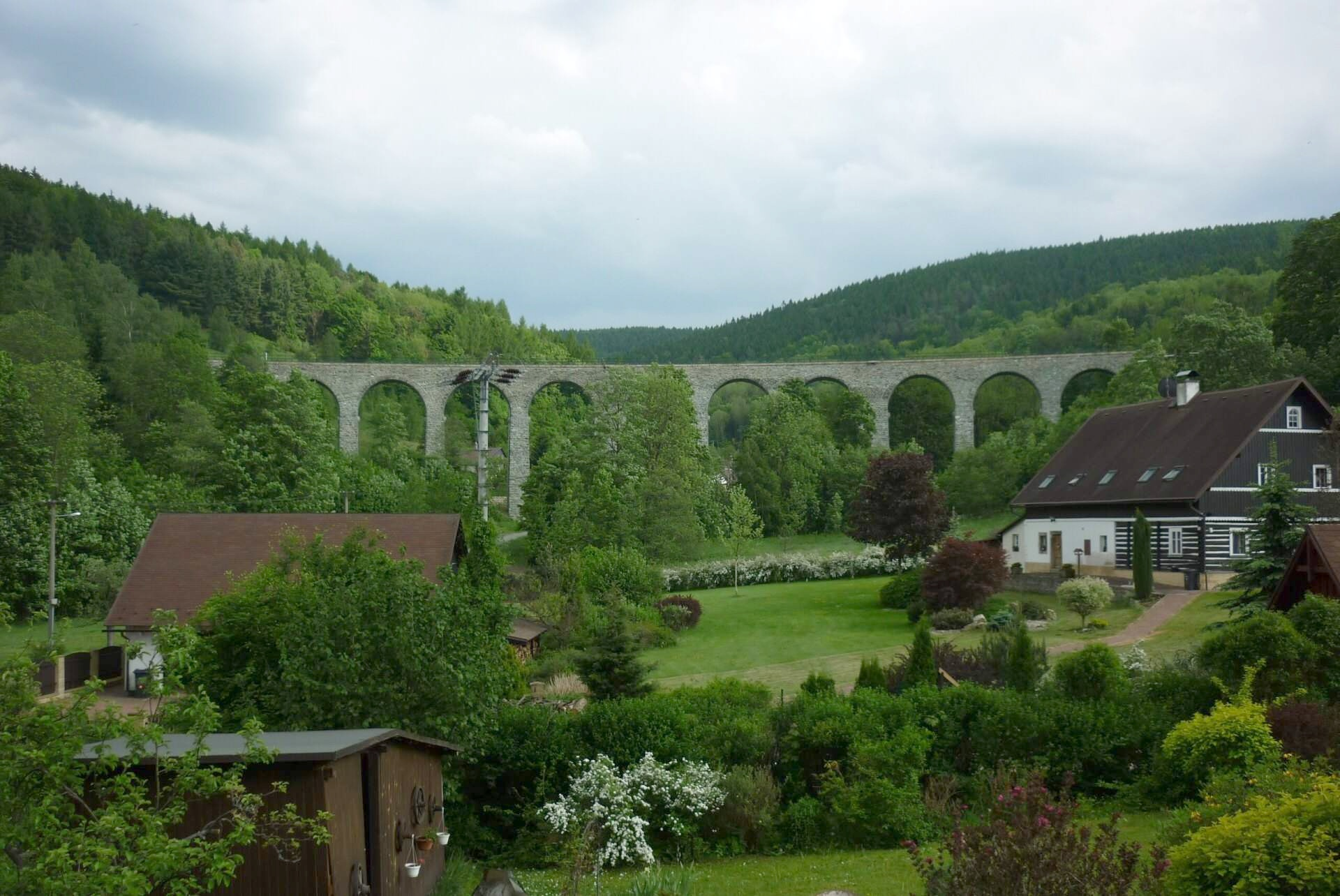 Viadukt u Noviny